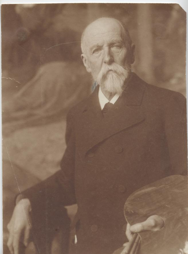 Ernst Hildebrand im Alter von 80 Jahren in seinem Atelier. Im Hintergrund ist sein letztes großes Gemälde "Die Kreuzigung Christi" erkennbar.